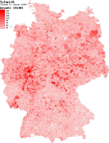 Verteilung des Nachnamens Schmidt in Deutschland nach dem Telefonbuch mit Stand vom 6. Januar 2005 Source: selbst erstellt Ersteller: W. Baumgartner